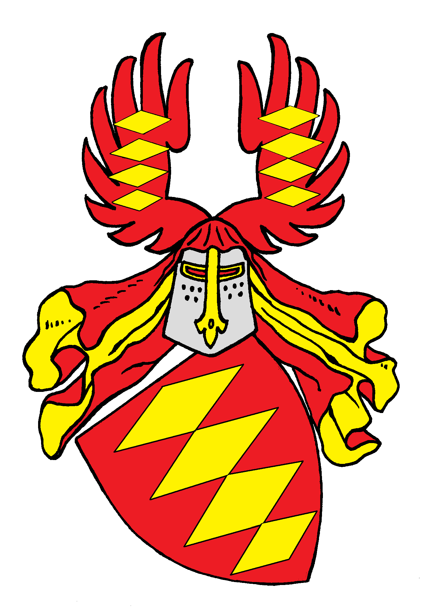 Das Wappen derer von Allstedt und von Glisberg zeigt auf Rot 4 senkrecht gestellte goldene Wecken. Auf dem Helm ein roter offener Flug, auf jedem das Motiv. Decken: rot-golden.